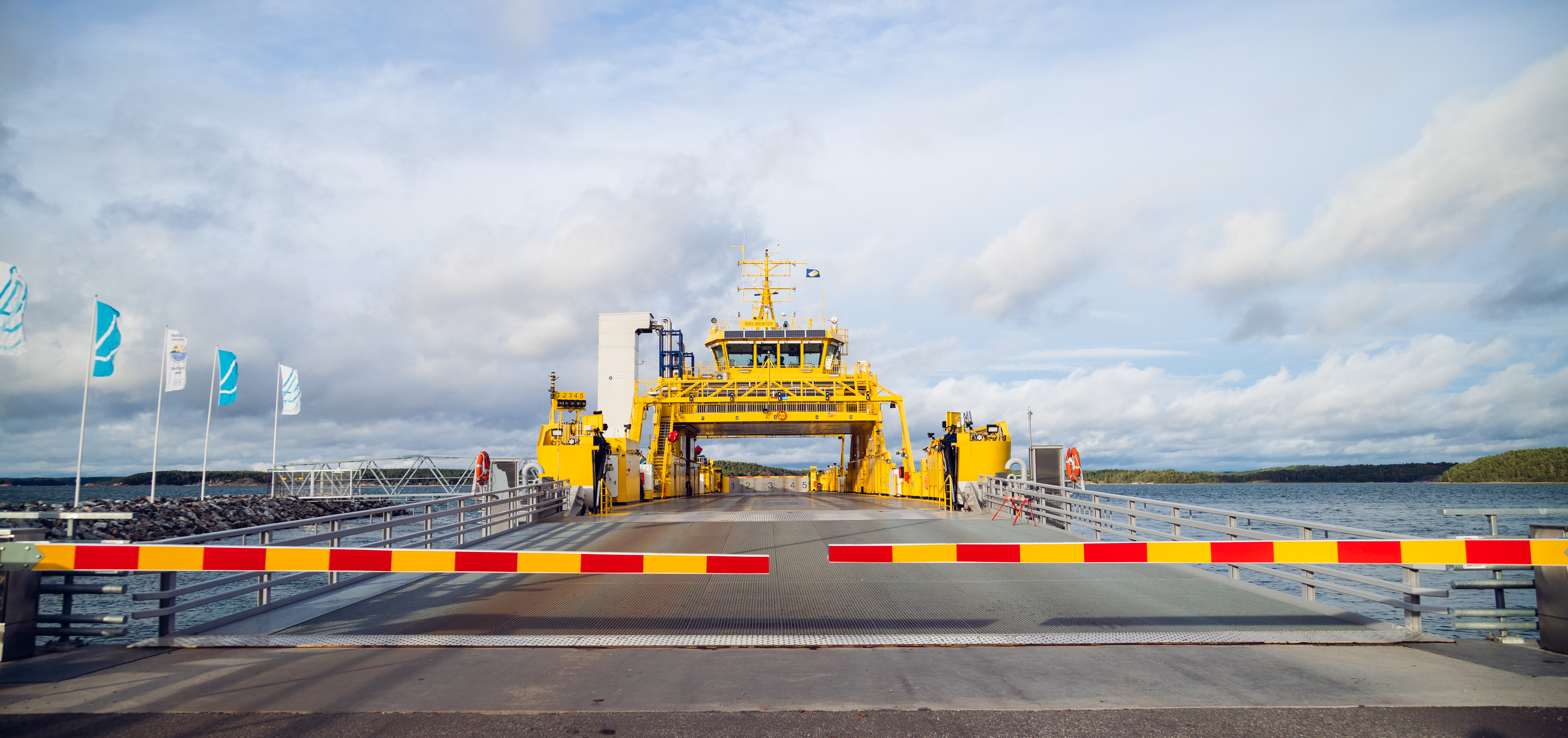 Nagu Pargas Prostvik färjfäste Elektra